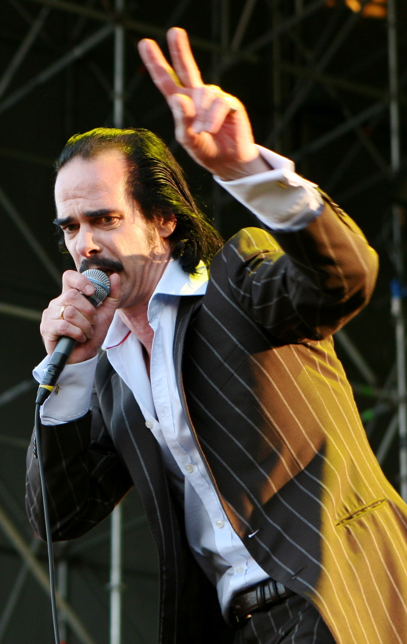 Nick Cave / Grinderman en el Summercase 08 de Barcelona